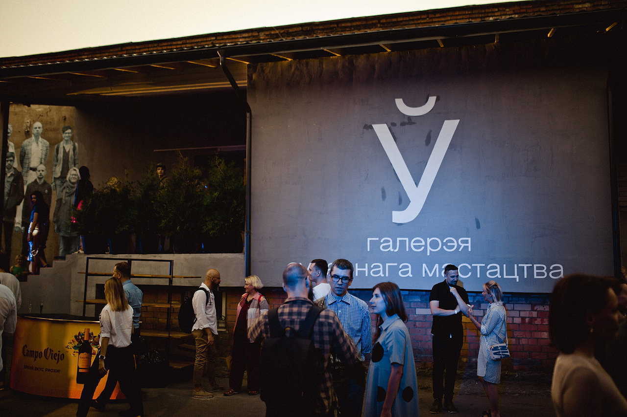 Художественная галерея в Беларуси